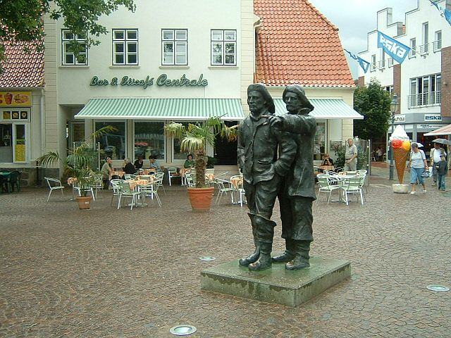 Neustadt in Schleswig Holstein, Marktplatz mit Fischerskulptur von Serge Mangin von 1994